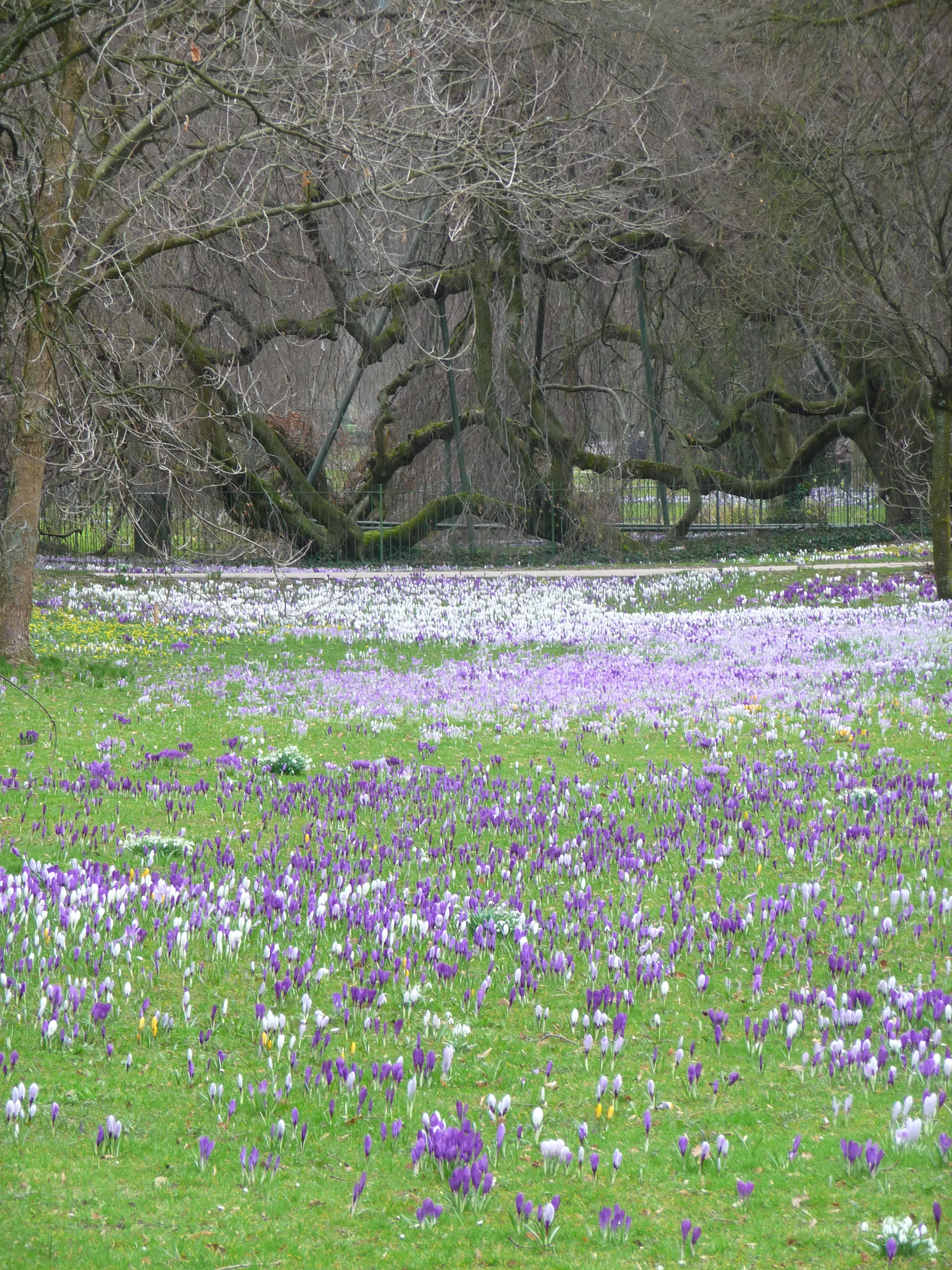 Krokusse auf einer Grünfläche an der Lichtentaler Allee in Baden-Baden (Baden-Württemberg, Deutschland)